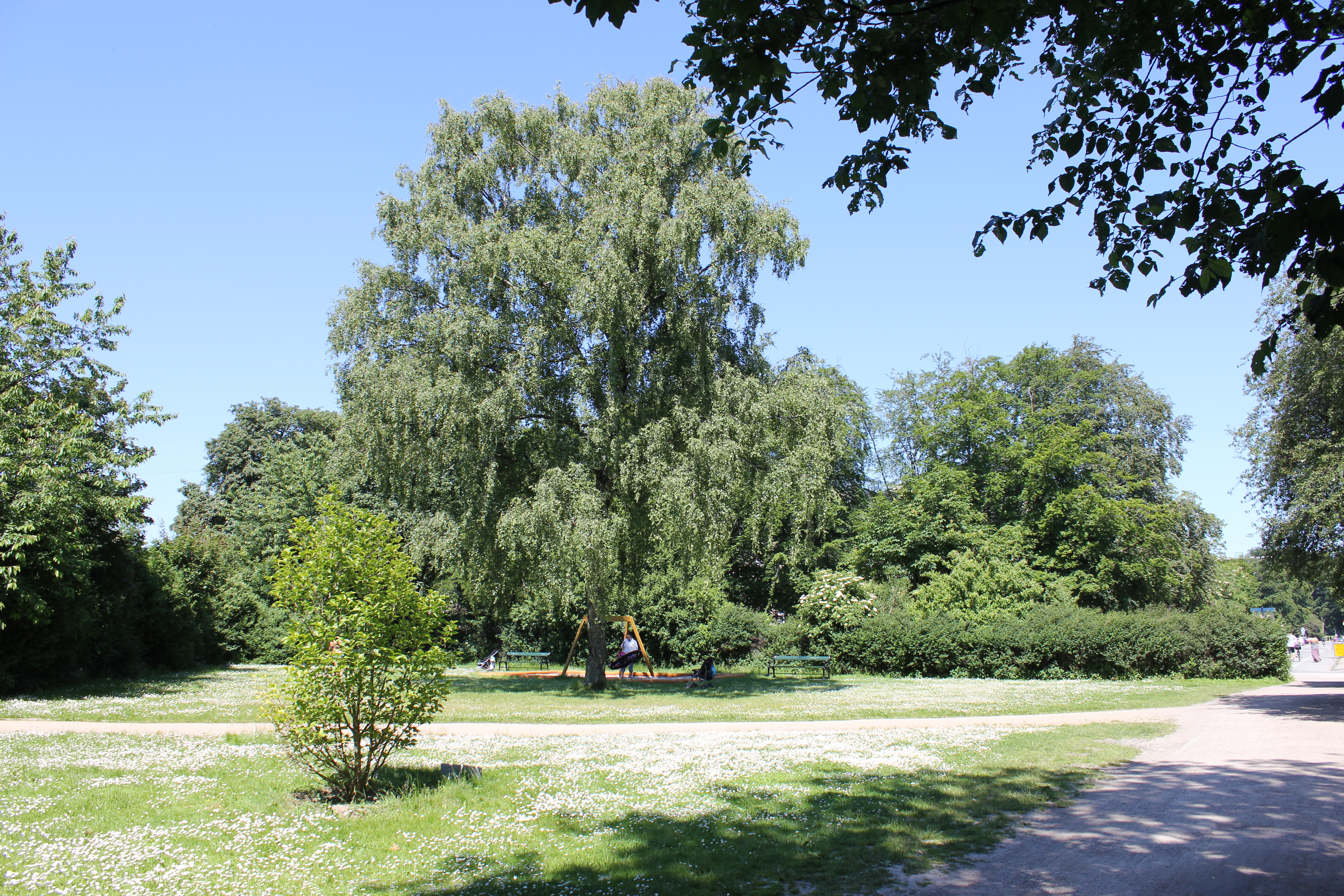 Amorparken in Copenhagen